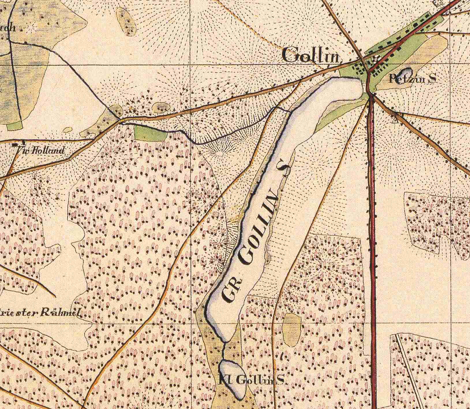 Gollin, Ortsteil der Stadt Templin, Landkreis Uckermark, Brandenburg, Deutschland, Ausschnitt aus dem Urmesstischblatt 2847 Vietmannsdorf von 1826